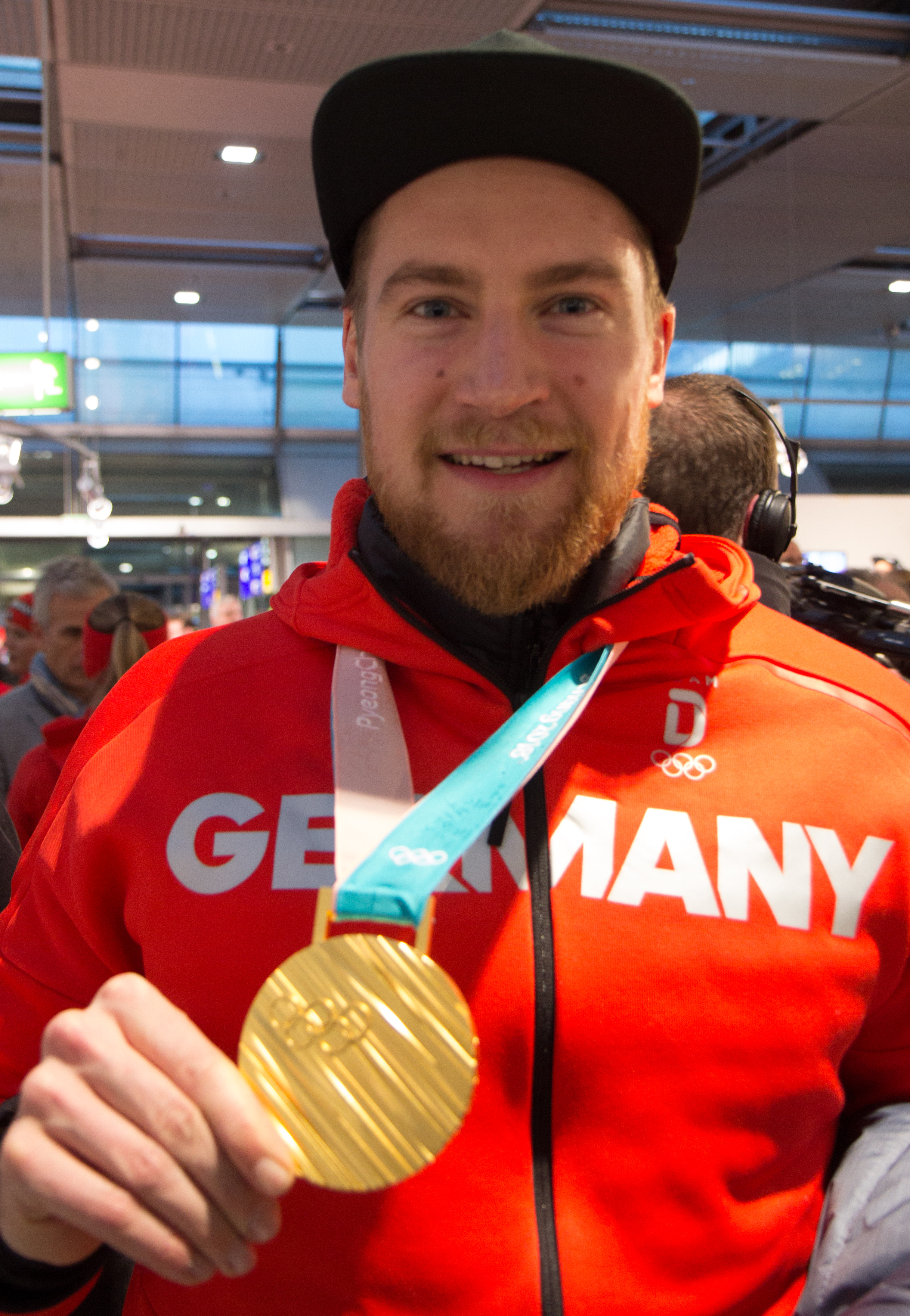 Ankunft der deutschen Olympiamannschaft am 26. Februar 2018 mit Flug LH713 auf dem Frankfurter Flughafen.